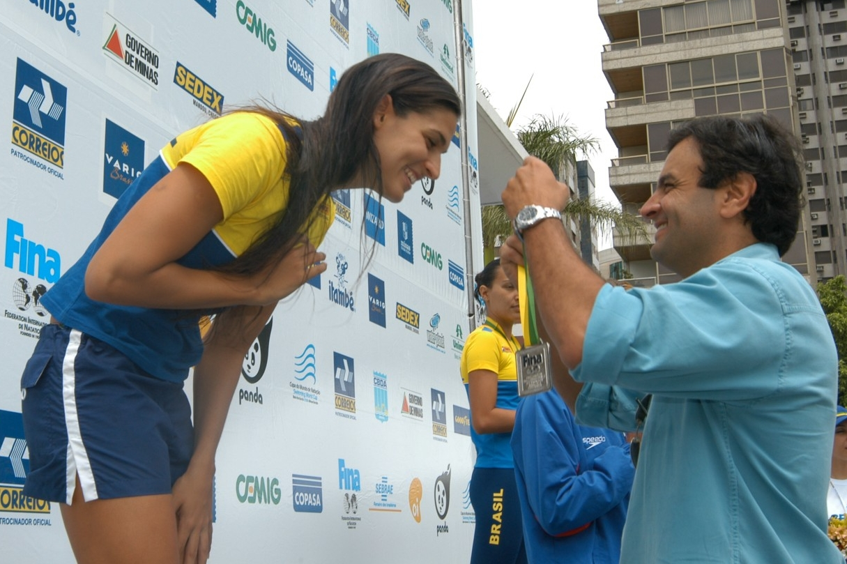 Mariana Brochado